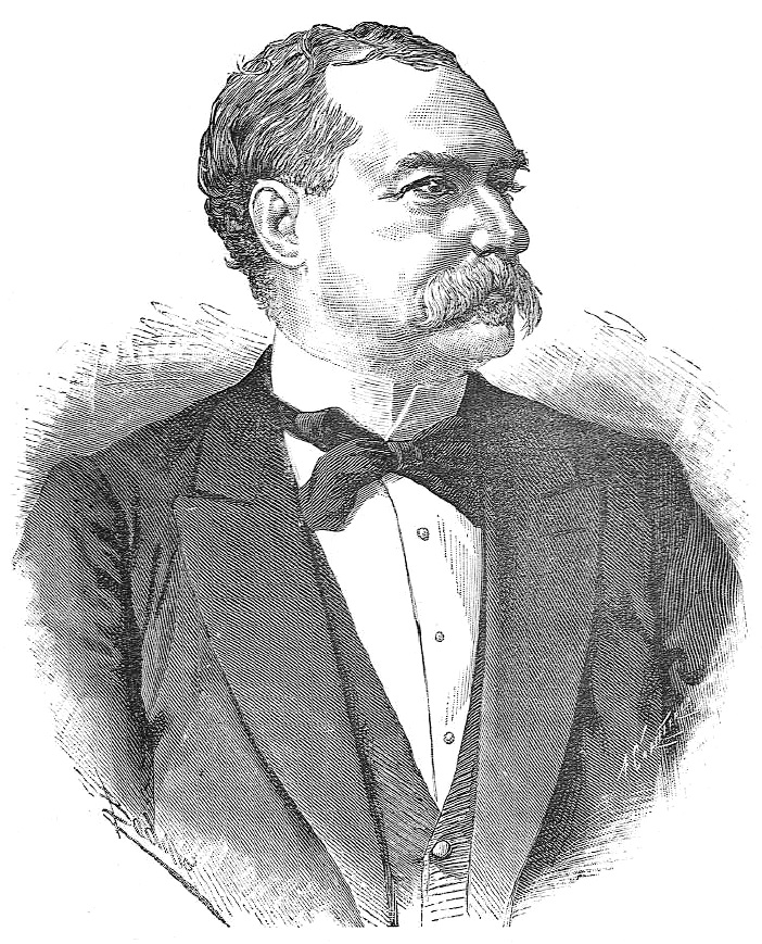 "Excmo. Sr. D. José de Elduayen, Marqués del Pazo de la Merced. Ministro de Estado". 16 x 12,5 cm.